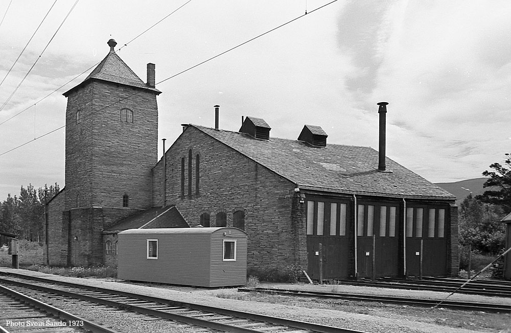 Oppdal lokomotivstall i skiftersteinsforblending, fotografert 1972